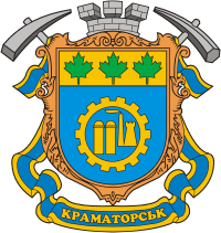 Герб Краматорська